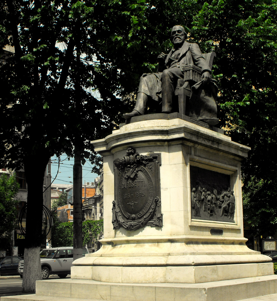 C.A.ROSETTI